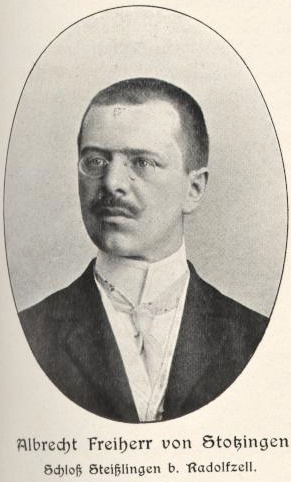 Albrecht Freiherr von Stotzingen (1864-1938), Mitglied der 1. Badischen Parlamentskammer, Badischer Kammerherr